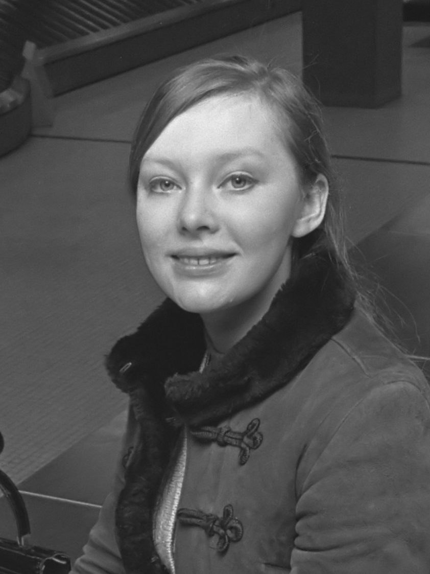 Russische filmactrice Liudmila Savalieva op Schiphol 3 februari 1972